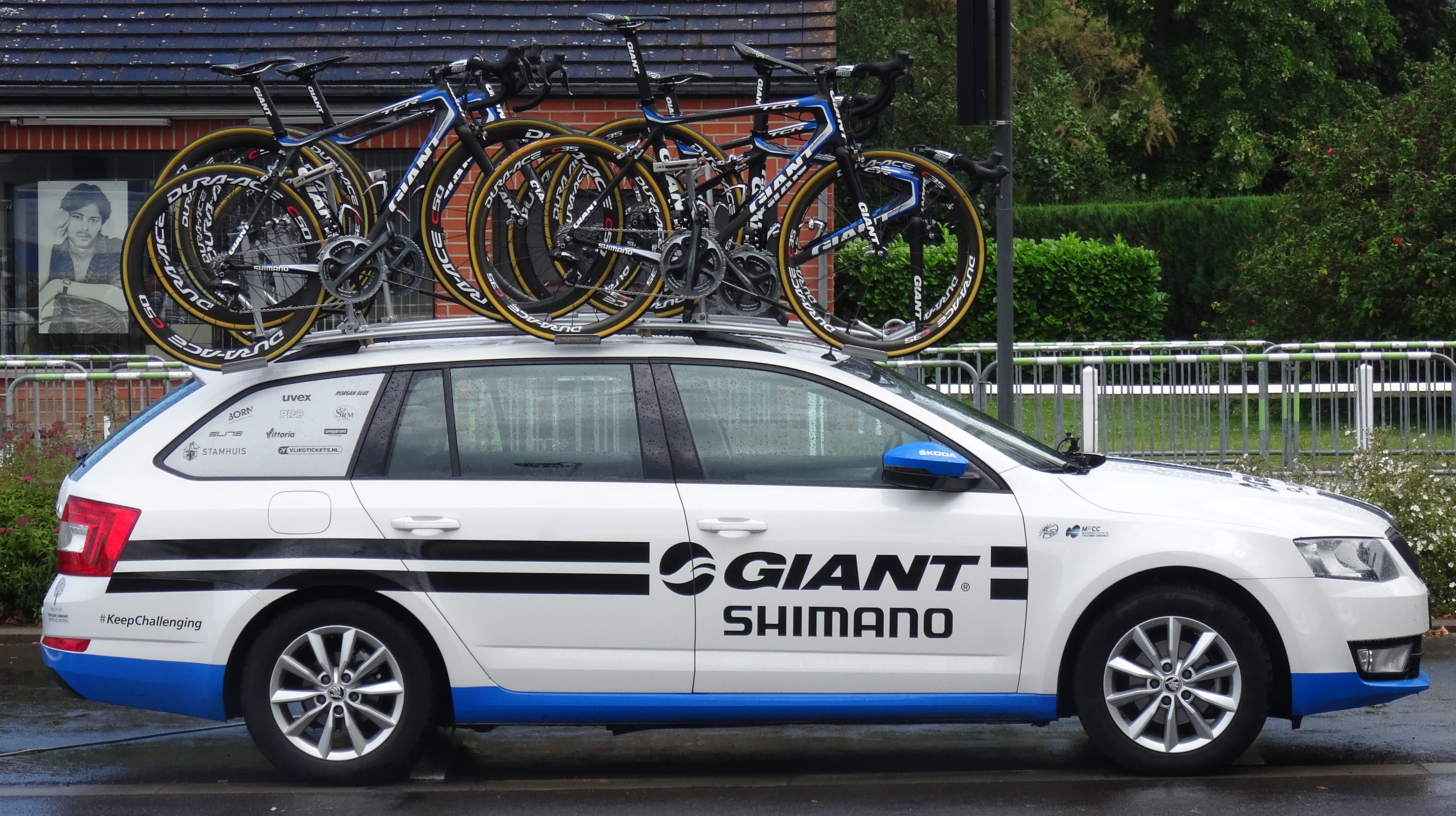 Reportage photographique réalisé le dimanche 8 juin à l'occasion du départ du Mémorial Philippe Van Coningsloo 2014 à Wavre, Belgique.